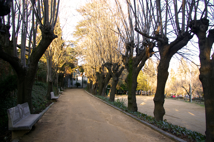 Jardins de Can Cendra a Anglès (La Selva, Catalunya)